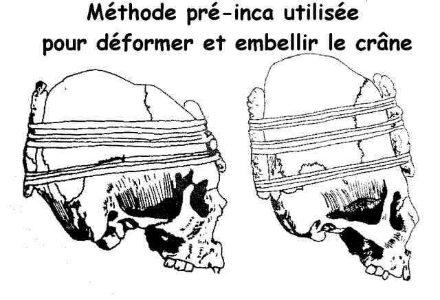 Méthode pré-inca utilisée pour déformer et embellir le crâne.